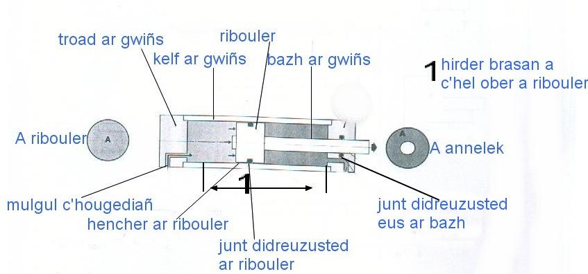 chema ur gwiñs hidrolek